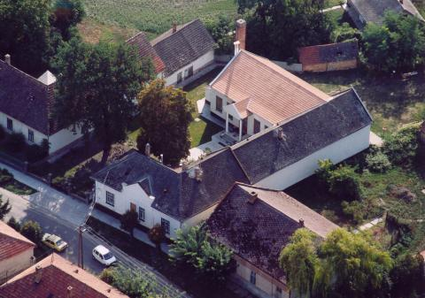 Apostag.